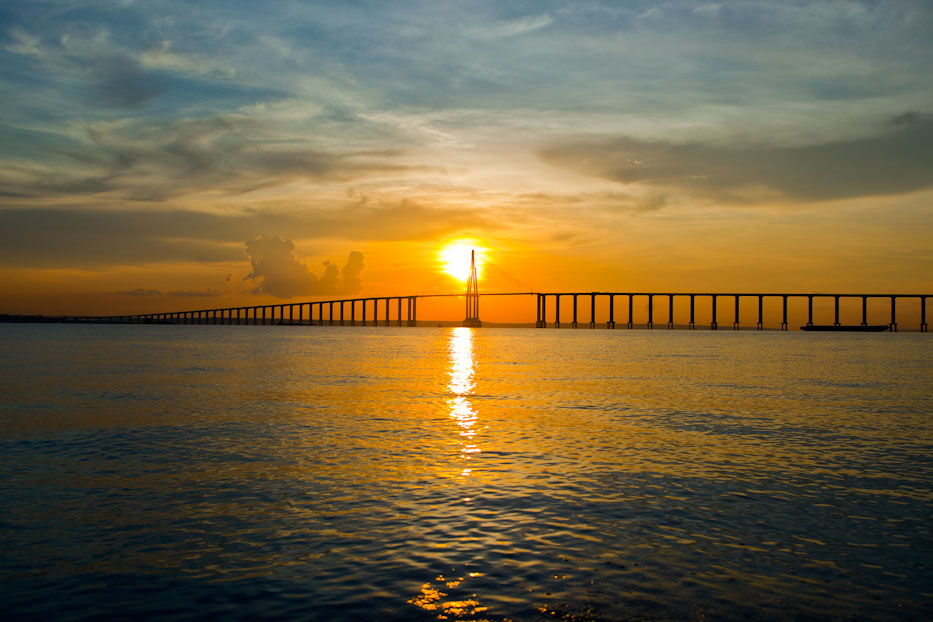 Ponte Rio Negro (Manaus)